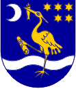 Blazono de Slavonski Brod.